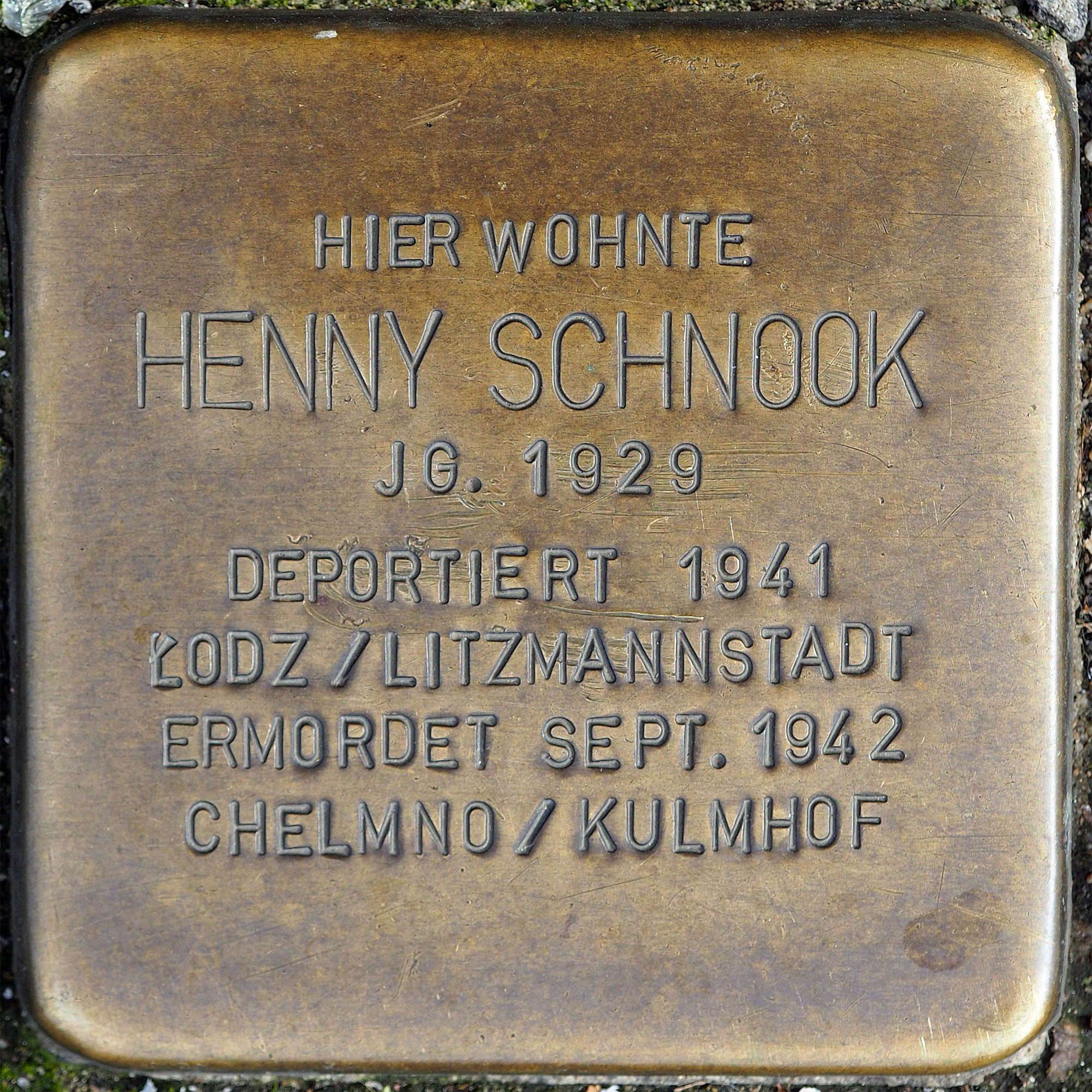 Stolpersteine MG: Schnook, Henny